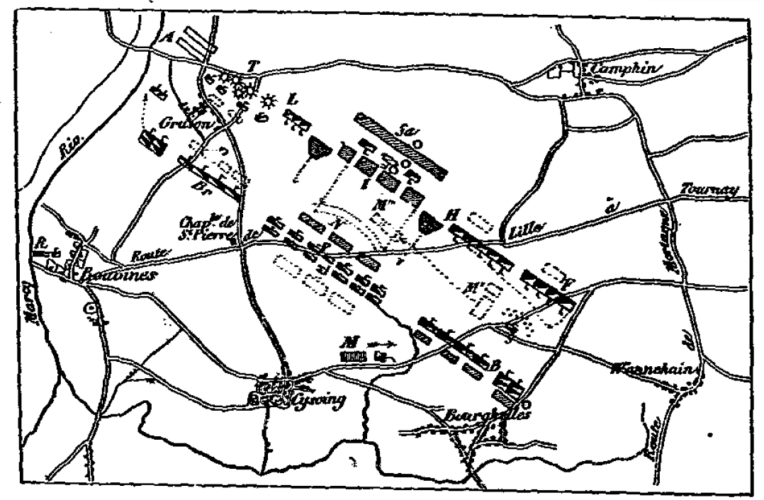 Carte du champs de bataille de Bouvines avec le positionnement des armées